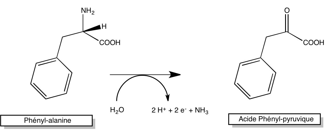 PDA forrmule